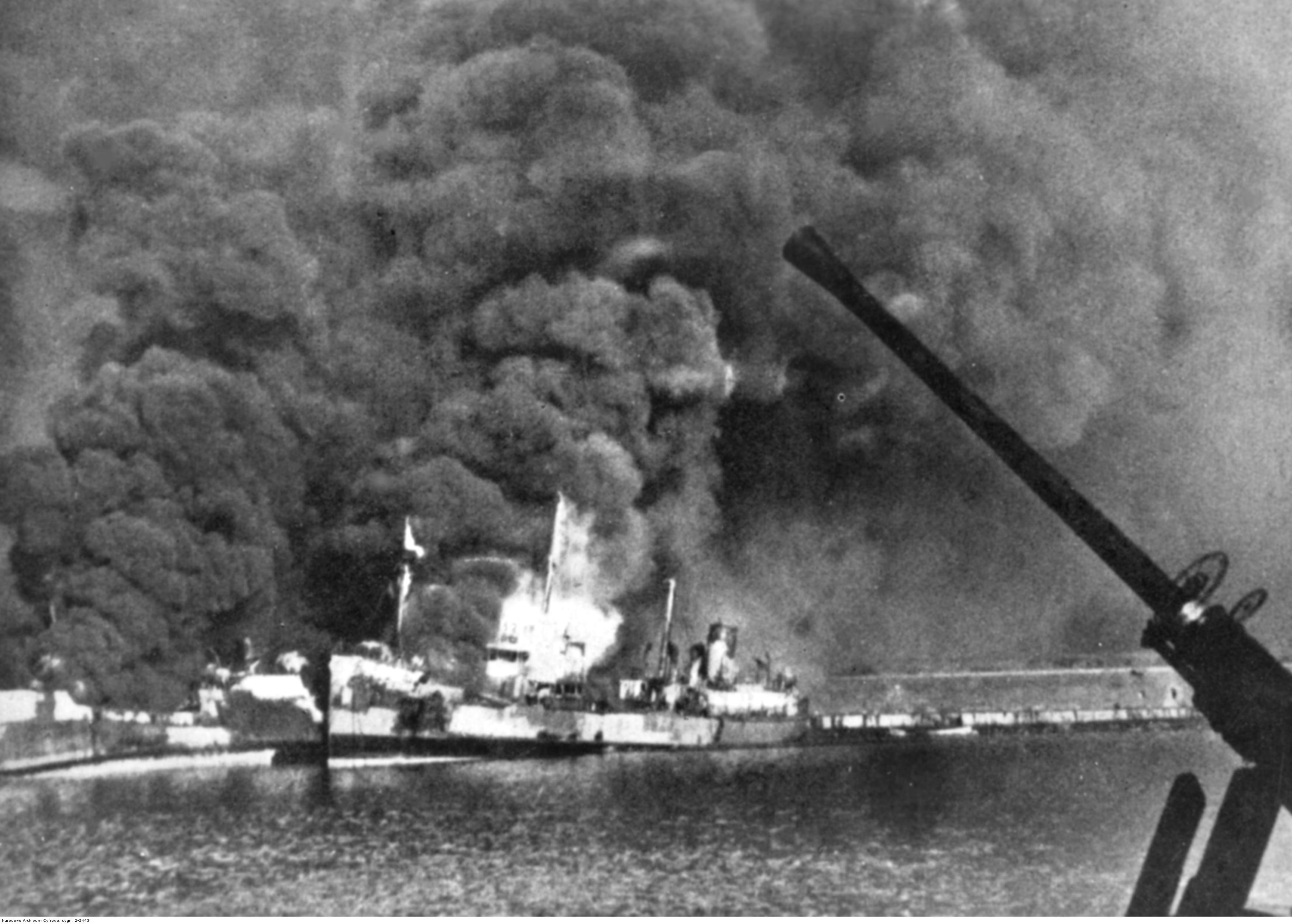 Atak niemieckiego lotnictwa na anglo-amerykańską flotę w porcie w Bari. Widoczne płonące okręty.